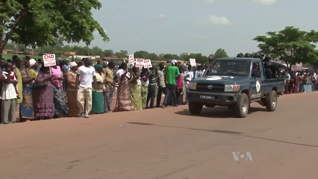 Un pick-up de la police burkinabé passe devant des manifestants opposés au coup d'état du régiment de sécurité présidentiel à Ouagadougou en 2015